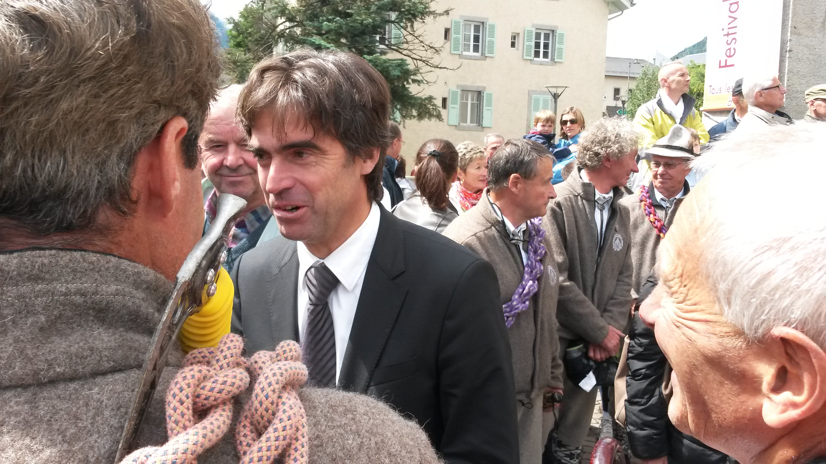 Éric Fournier, maire de Chamonix-Mont-Blanc à la sortie de la messe célébrée en la fête de l'Assomption de la très sainte Vierge Marie, le vendredi 15 août 2014.